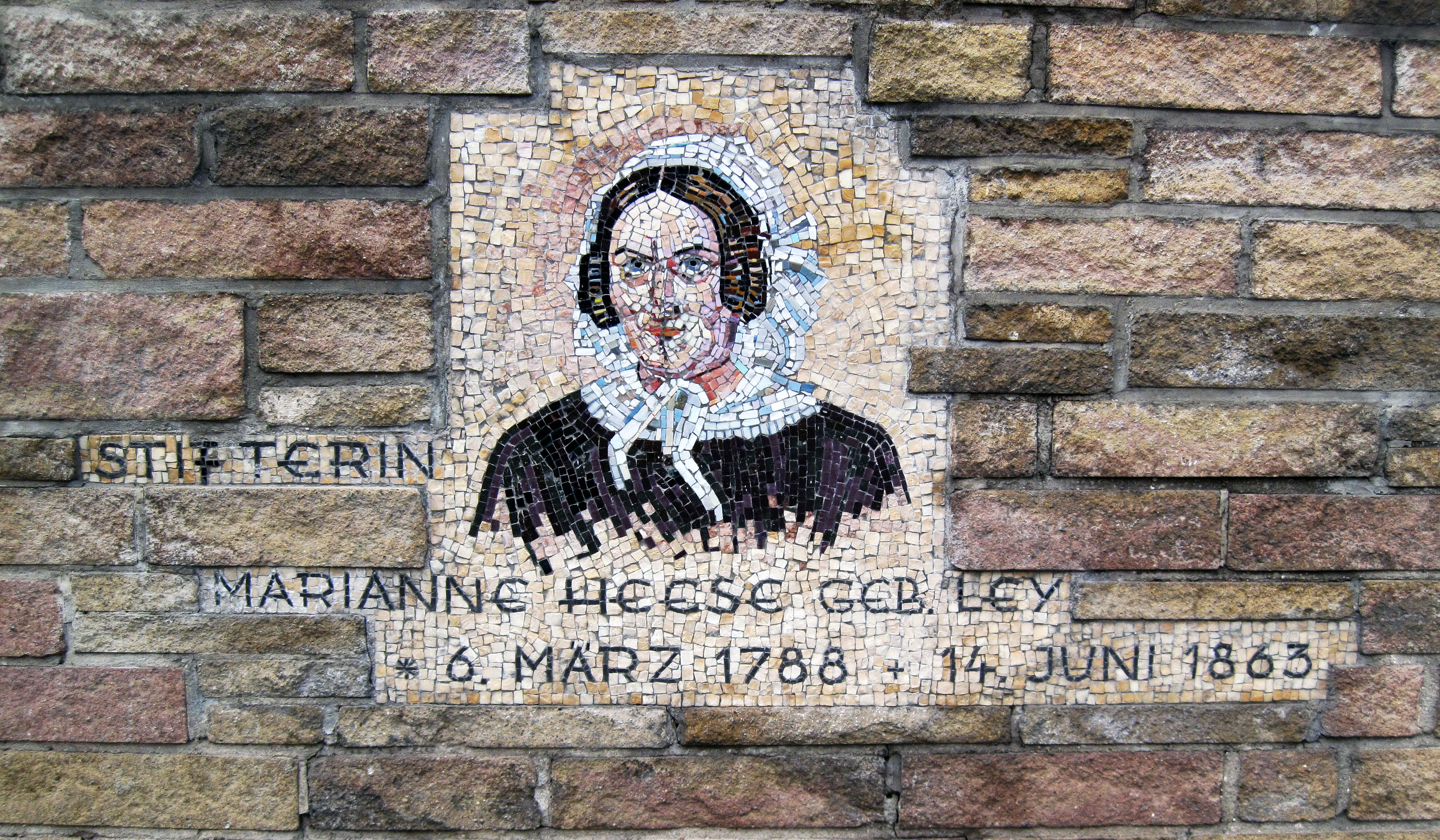 Werl, Kämperstraße 53, Baudenkmal, Elisabeth-Kinderheim, Marianne Heese